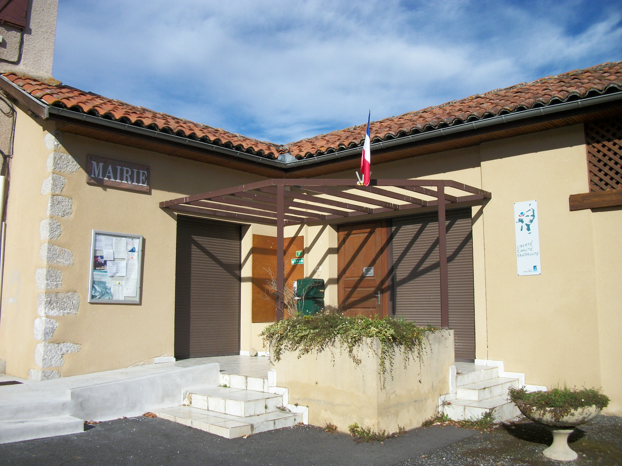 Mairie de Seilhan